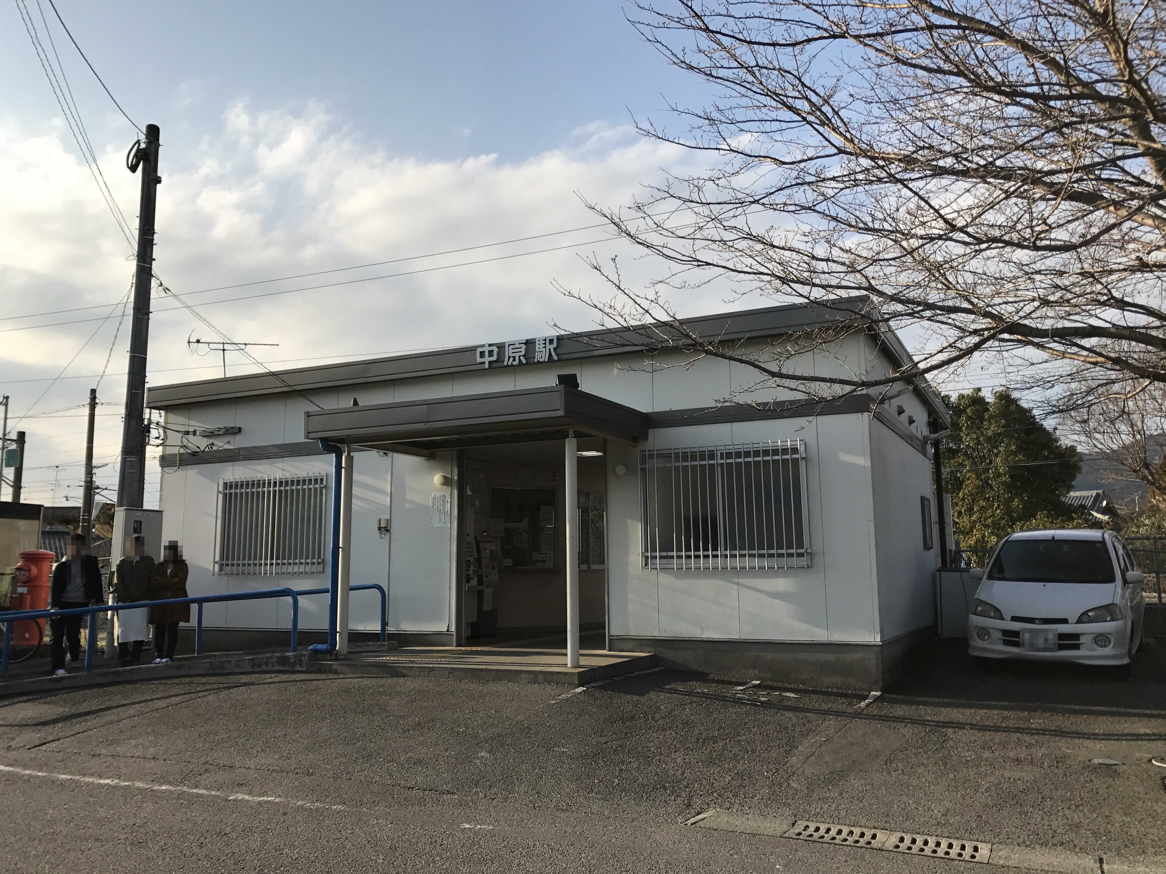 中原駅駅舎